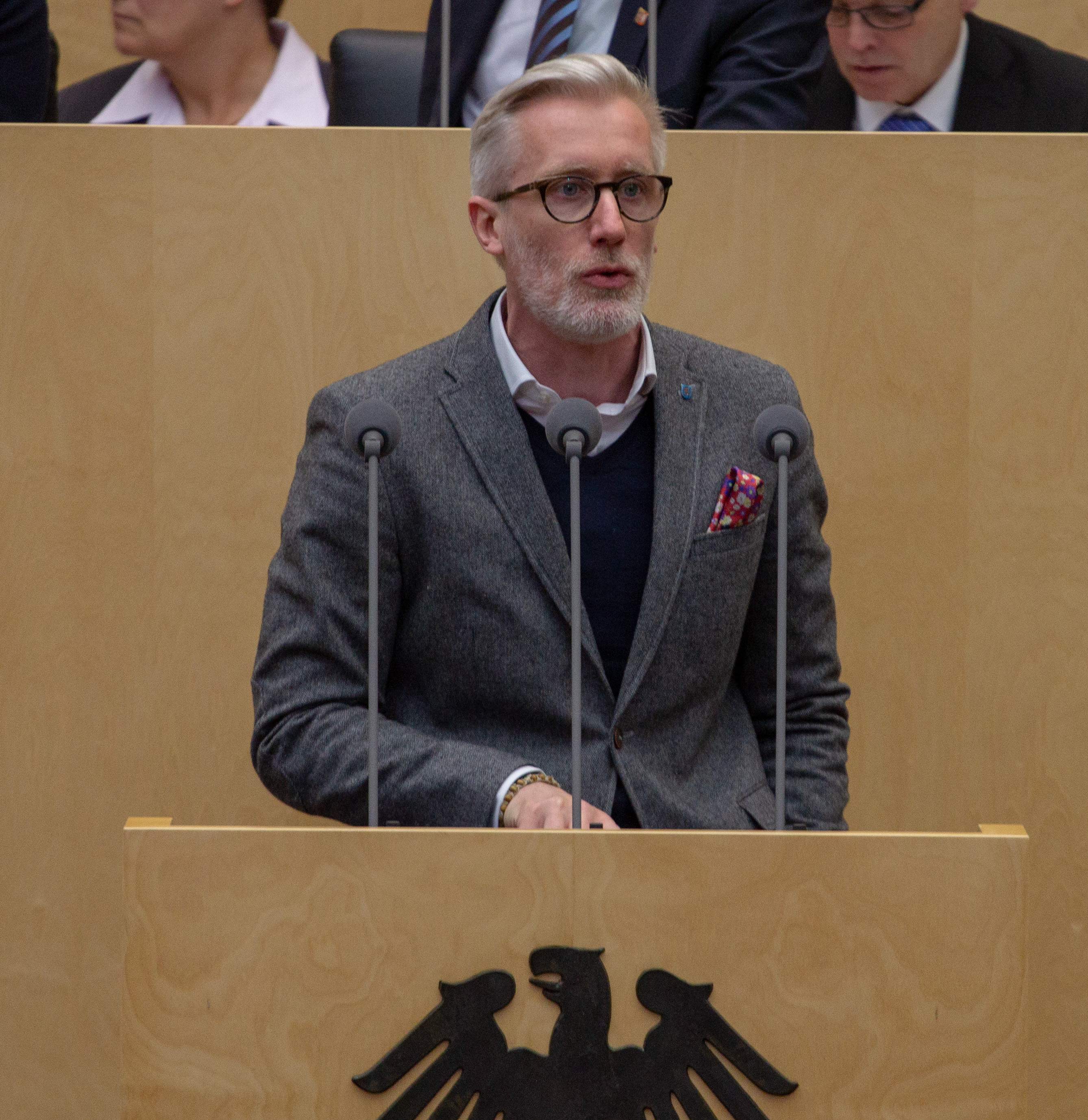 Plenarsitzung des Bundesrates am 12. April 2019 in Berlin.